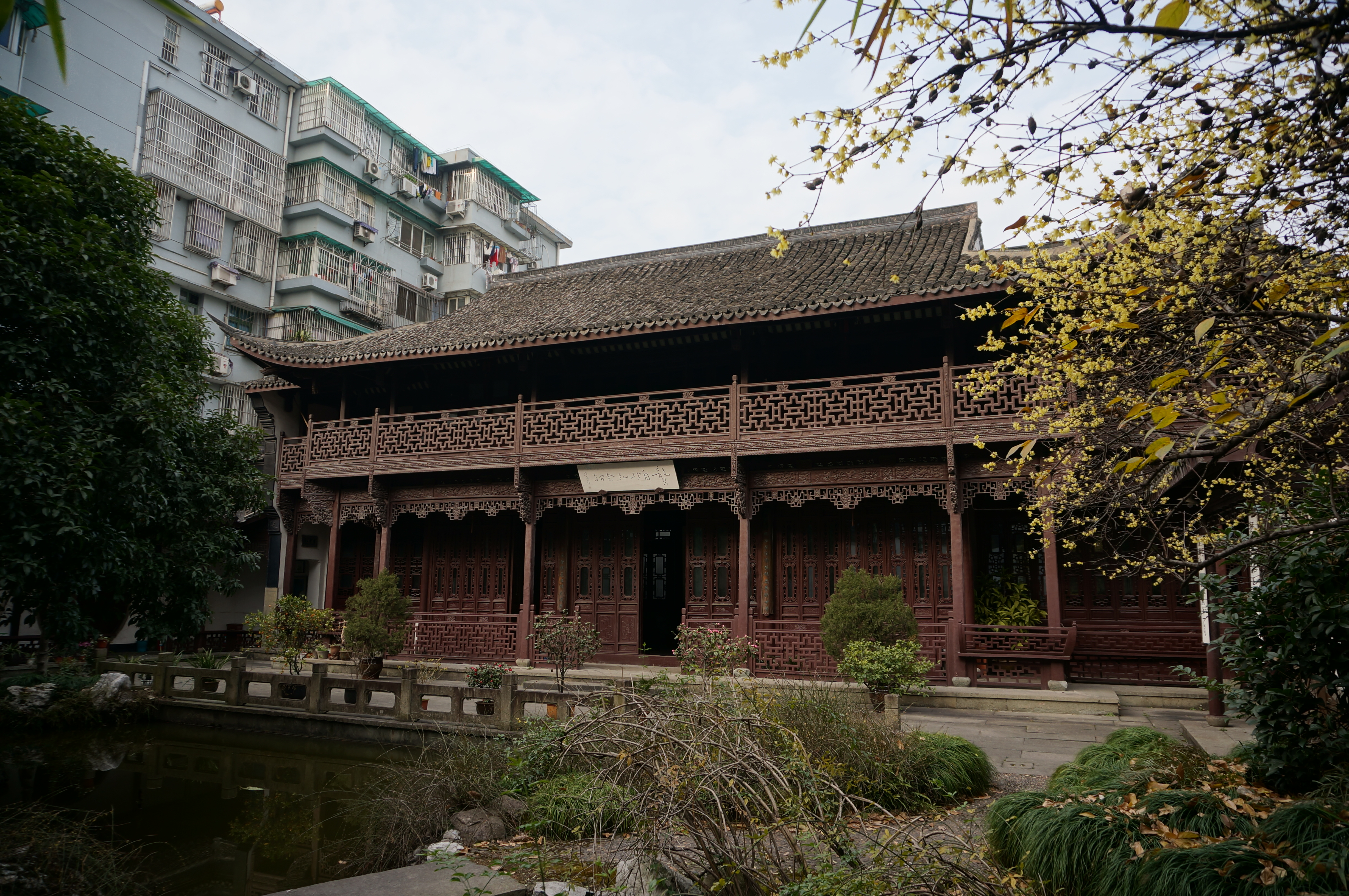 杭州龚自珍纪念馆（小米园），小米山房及庭院。